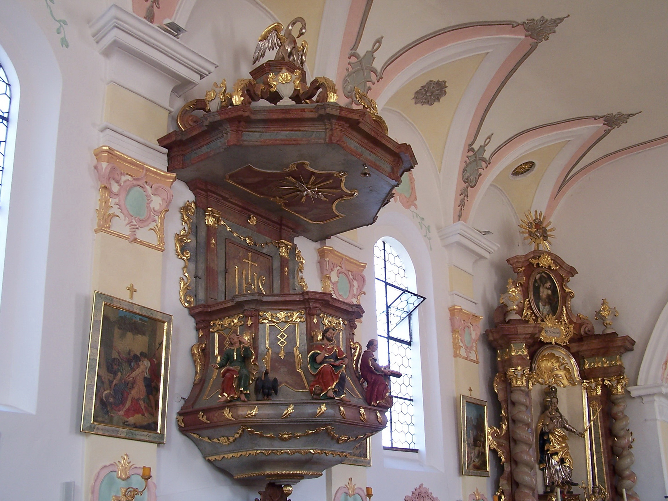 Langquaid Marktplatz 14. Katholische Pfarrkirche St. Jakob d. Ä. Saalkirche mit Steildach, eingezogenem Rechteckchor und Chorscheitelturm, Portalvorhalle nach Süden, Chor und Turm im Kern romanisch, 13. Jahrhundert, Langhaus spätgotisch, 15. Jahrhundert, Barockisierung der Anlage um 1740, Verlängerung nach Westen, 1917. Kanzel mit polygonem Korpus mit Schnitzfigürchen der Evangelisten.